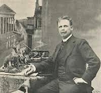 Autoportrait d'Otto Wegener, sur son balcon. Date inconnue